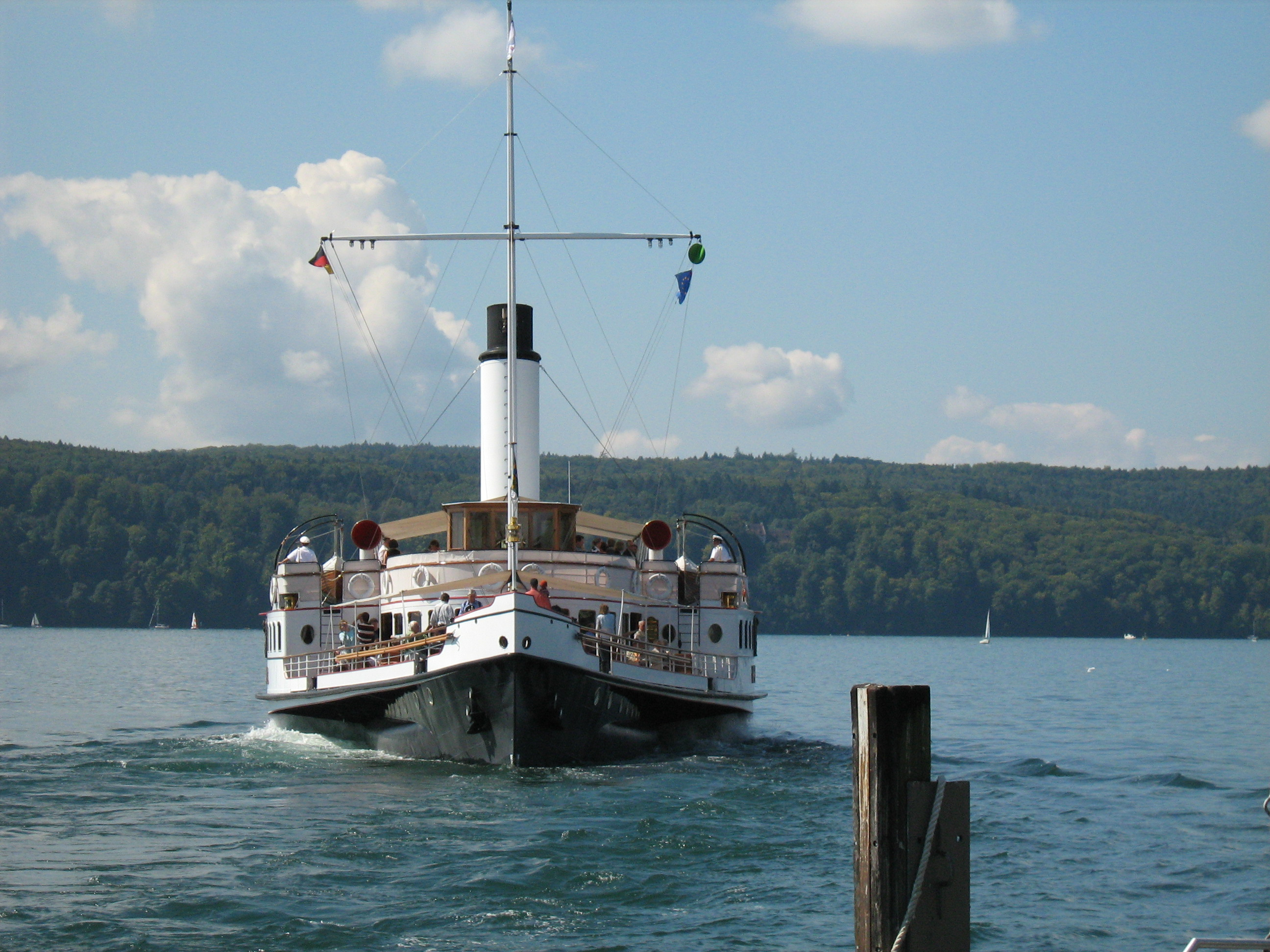 Bodensee Raddampfer Schiff - Hohentwiel